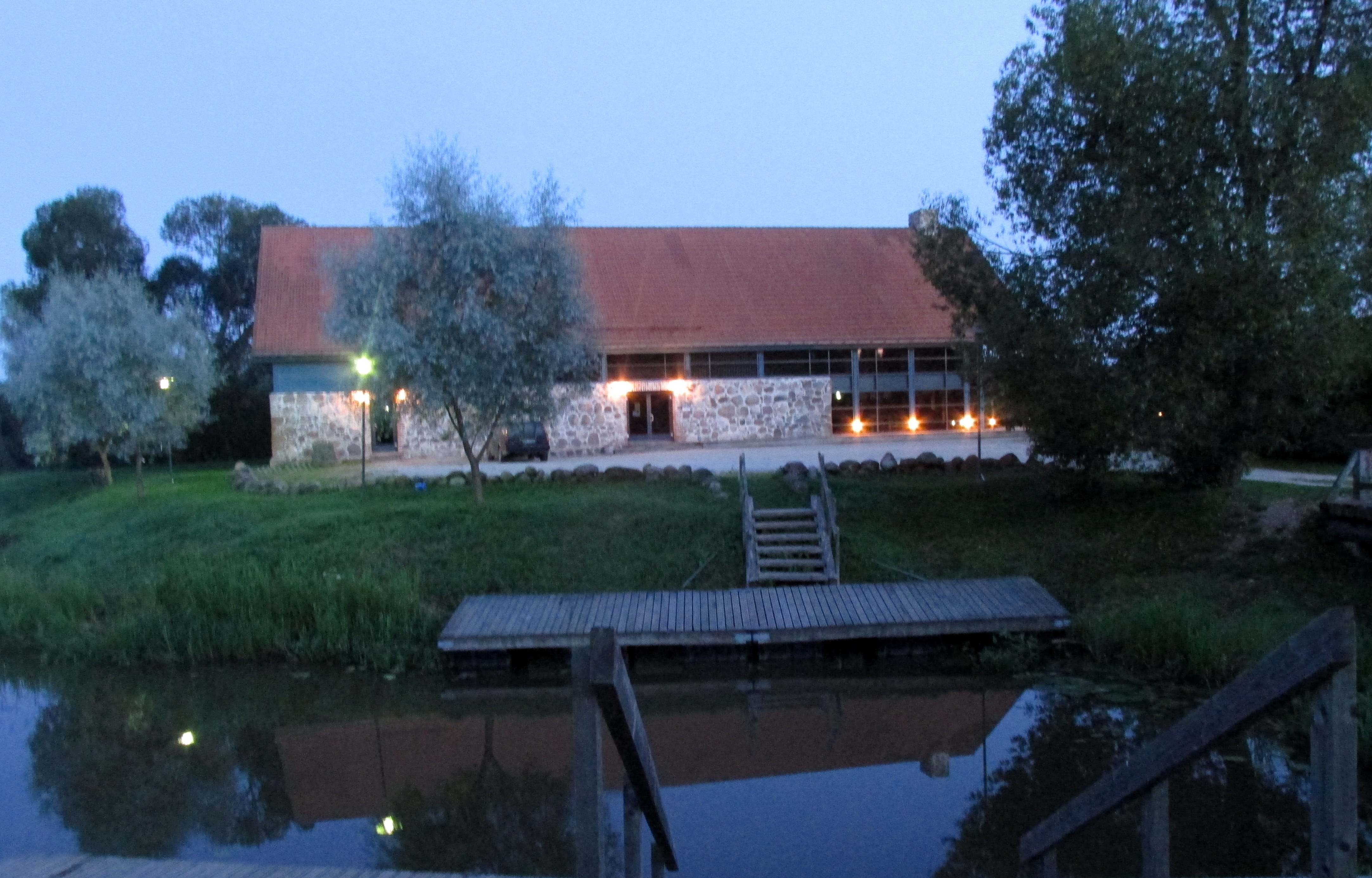 Uue-Kastre linnuse ala Tartumaal